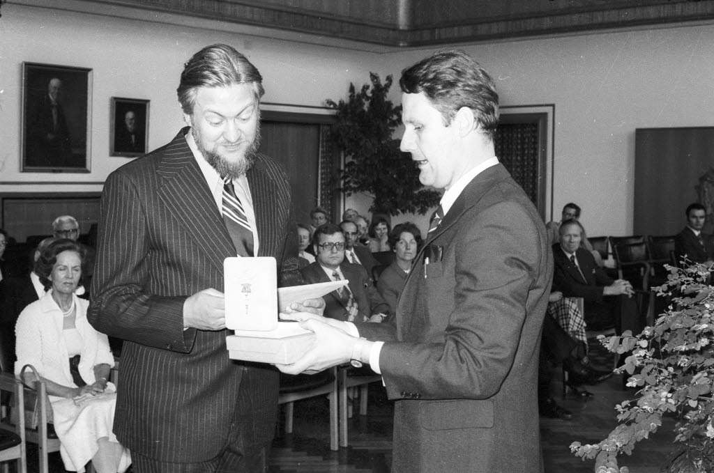 im Ratssaal. Der Preis wird von der Stiftung F.V.S. zu Hamburg vergeben und ist mit 25.000 DM dotiert. Der Vizepräsident der Christian-Albrechts-Universität (CAU) Prof. Werner Kaltefleiter (rechts) übergibt den Henrik-Steffens-Preis an den isländischen Lyriker Hannes Petursson (links).